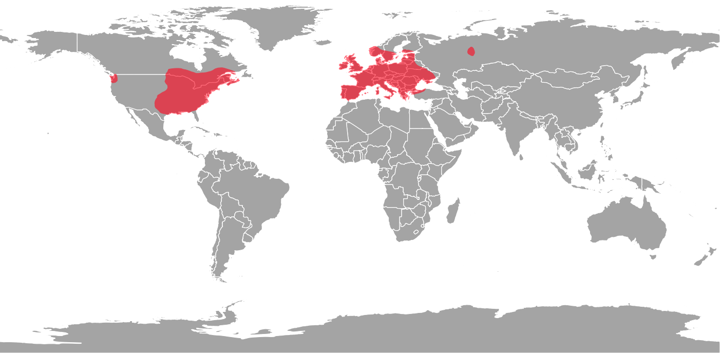 Distribution of the white nose syndrom; by works of Fritze, Puechmaille et al., Zukal et al.